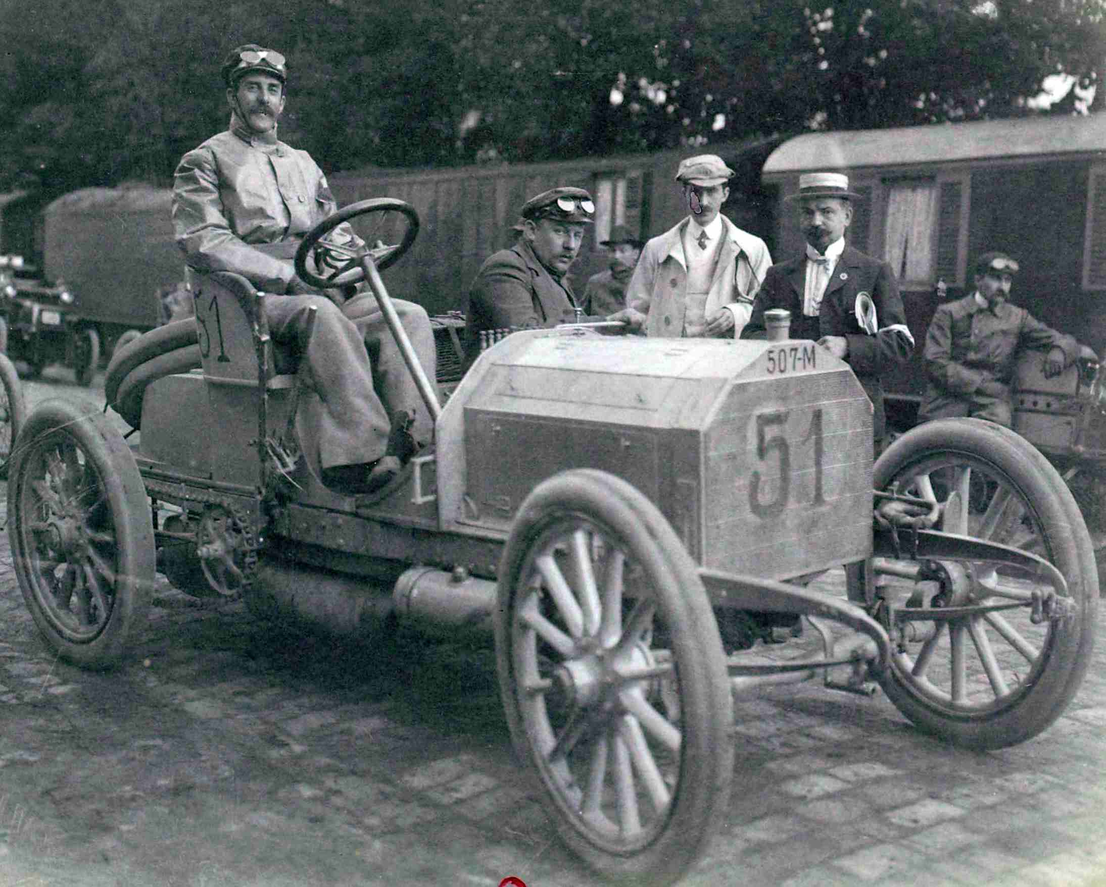 [Collection Jules Beau. Photographie sportive] : T. 18. Année 1902 / Jules Beau : F. 43v. [Circuit des Ardennes, Bastogne, 30 juillet 1902]